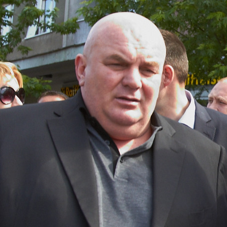 Kandidat za predsednika Srbije i predsednik Demokratske stranke Boris Tadić posetio je Jagodinu gde je u centru grada razgovarao sa građanima i predsednikom Jedinstvene Srbije Draganom Markovićem Palmom. (8. maj 2012); Foto servis DS